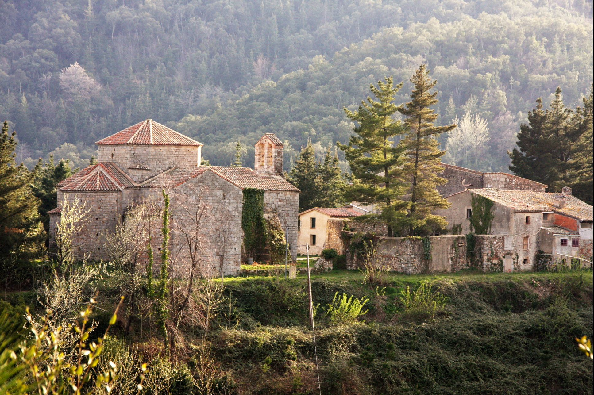 Barri de Sant Pere Cercada (Santa Coloma de Farners-Catalunya), amb l'església del monestir agustinià de 1136.